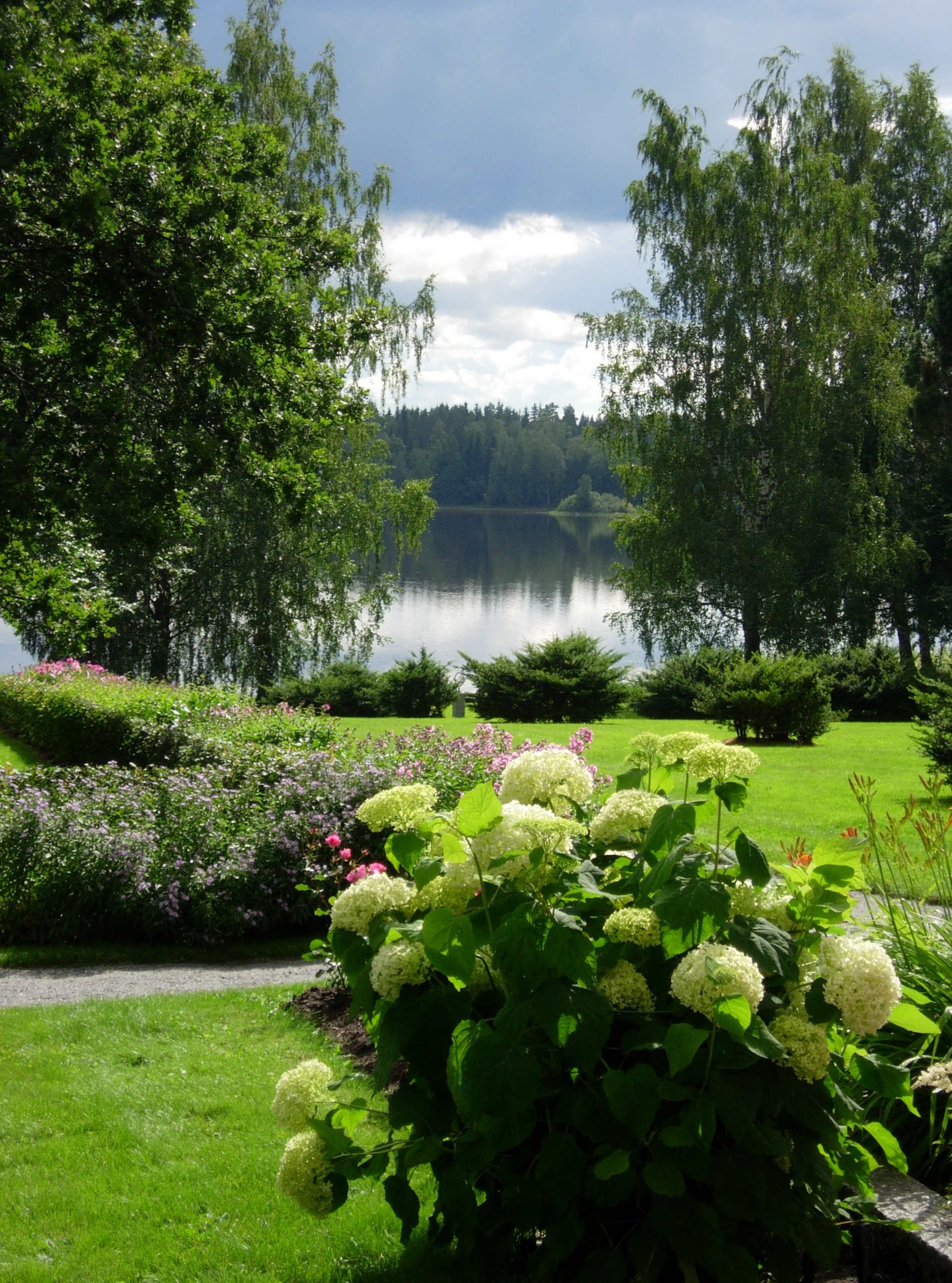 Gösta Serlachiuksen taidemuseon pihaa ja Melasjärveä. Mänttä-Vilppula.